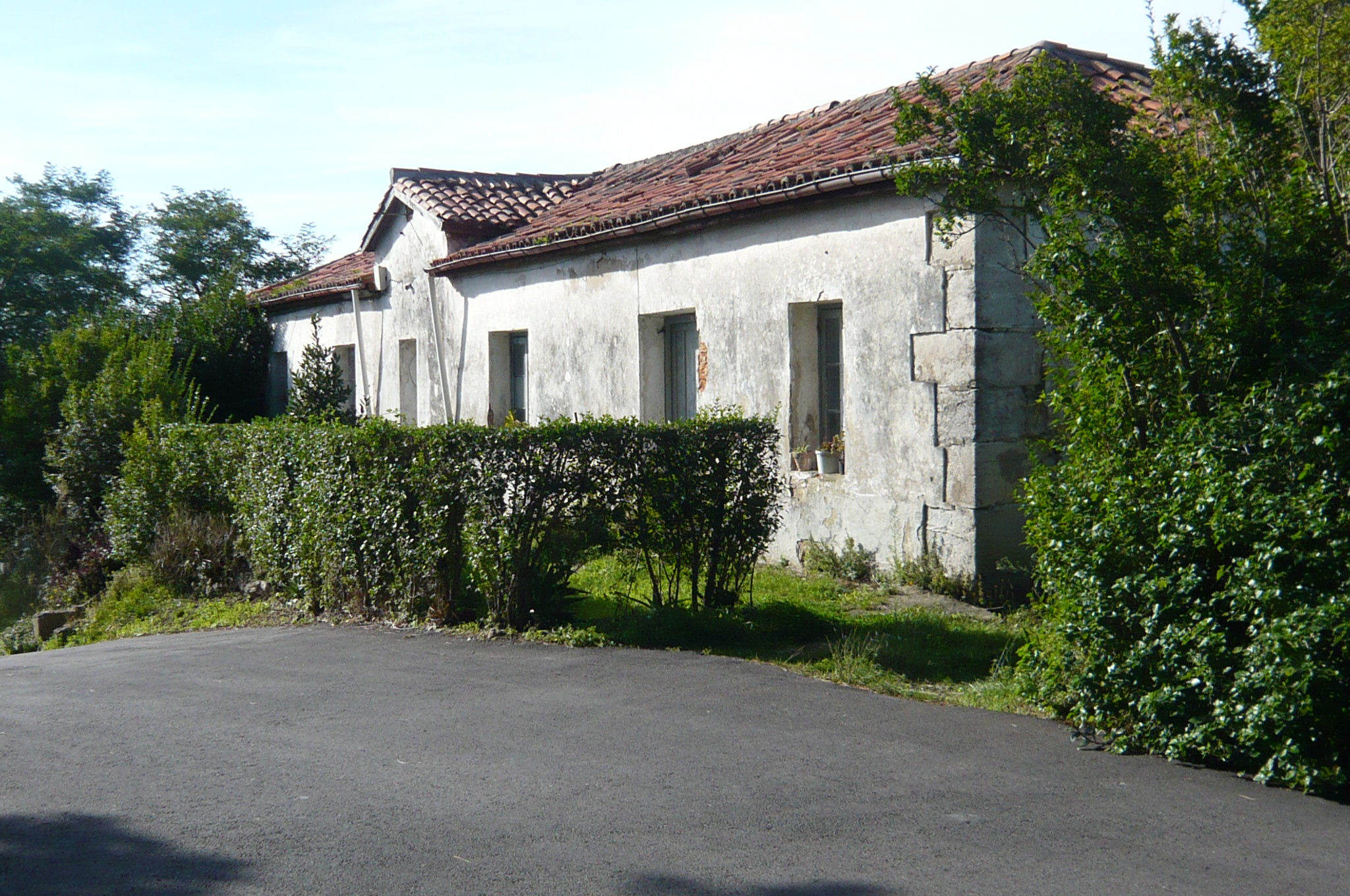 Antiguo cuartelillo de la Guardia Civil, Pedreña, Marina de Cudeyo, Cantabria, España